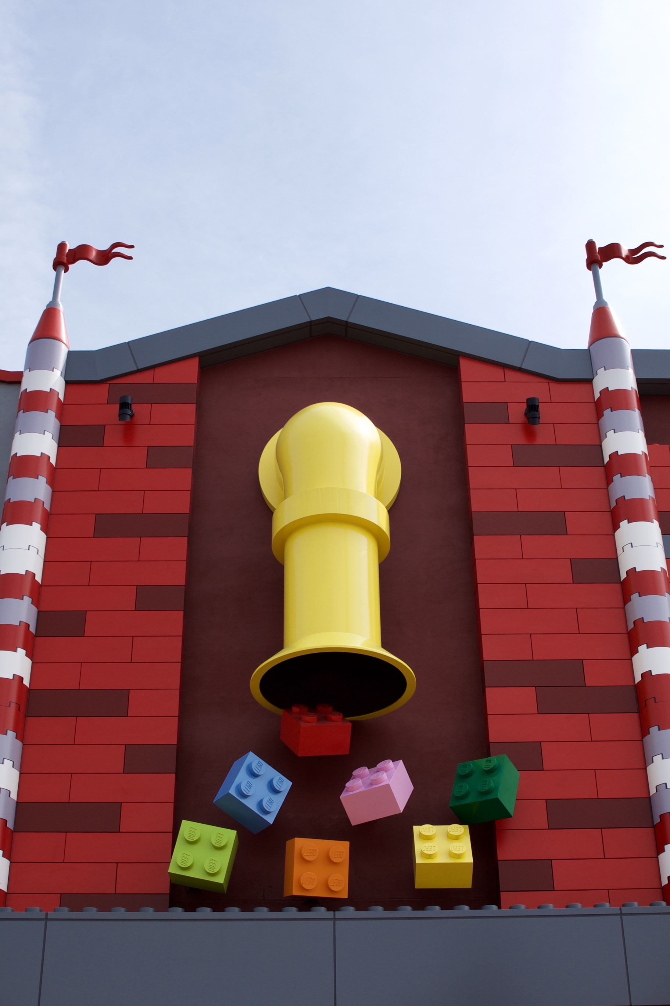 レゴランドジャパン BIG LEGO